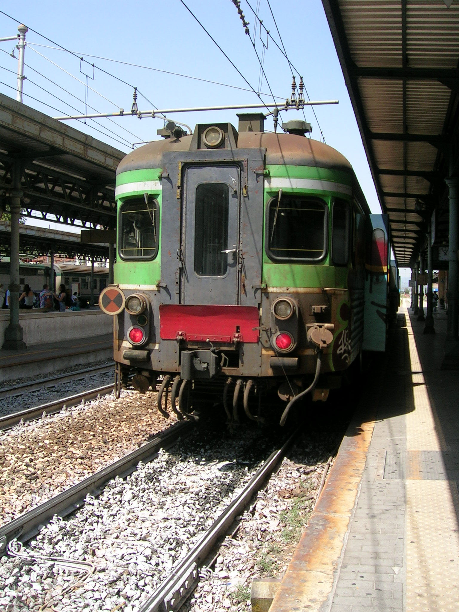 Elettromotrici serie ALe 054 della La Ferroviaria Italiana (LFI) in stazione ad Arezzo